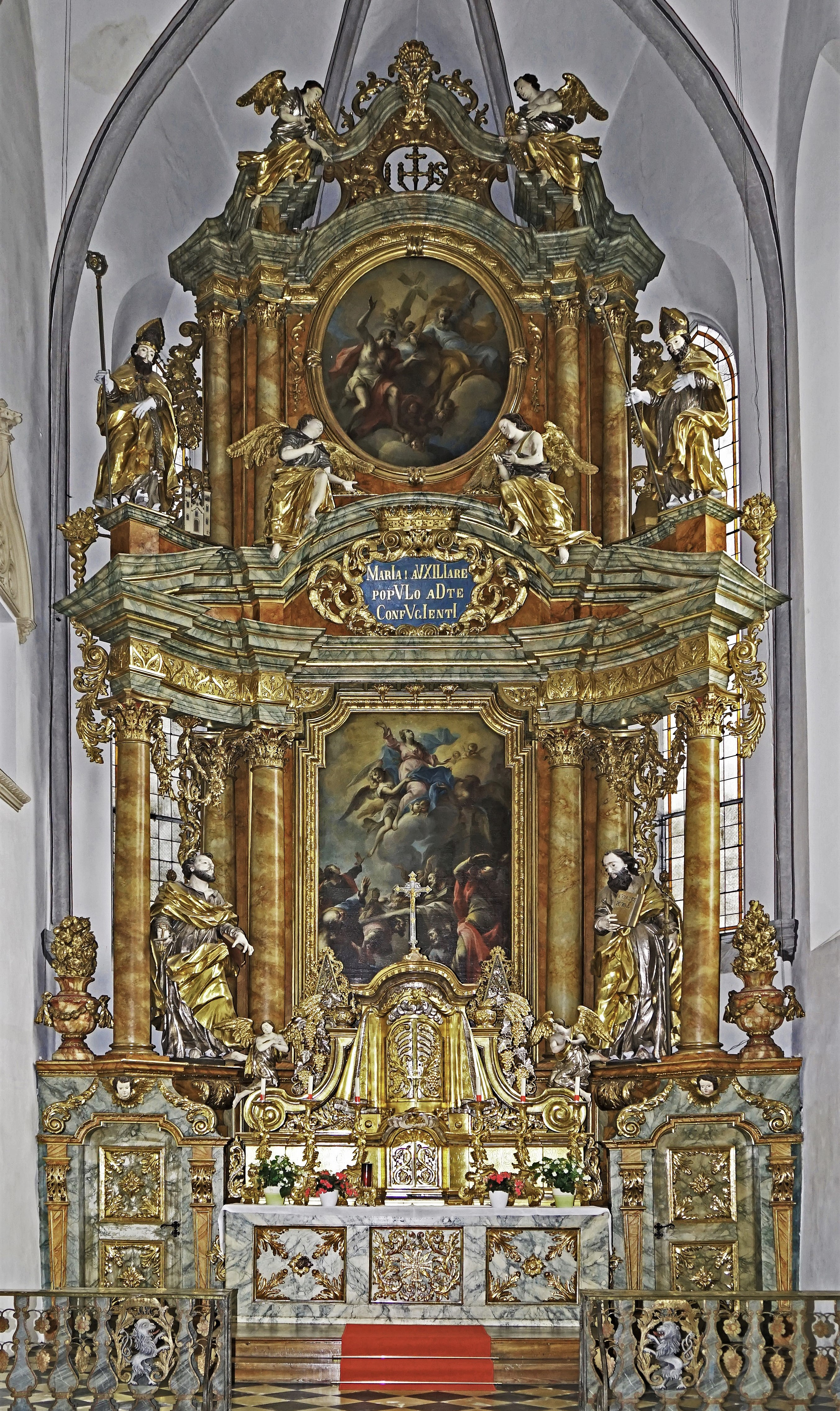 Kath. Pfarrkirche Mariä Himmelfahrt, Gmünd in Kärnten, barocker Hochaltar